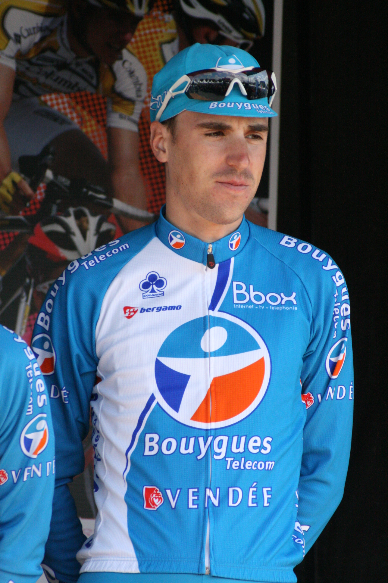 Matthieu Sprick, lors de la présentation des équipes des 4 jours de Dunkerque 2010